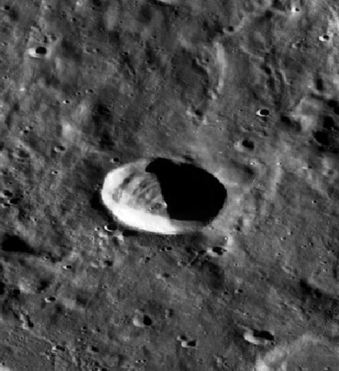 Cráter Chadwick (LROC)